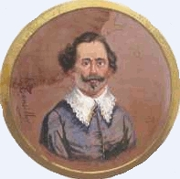 Ritratto di Luigi Tansillo